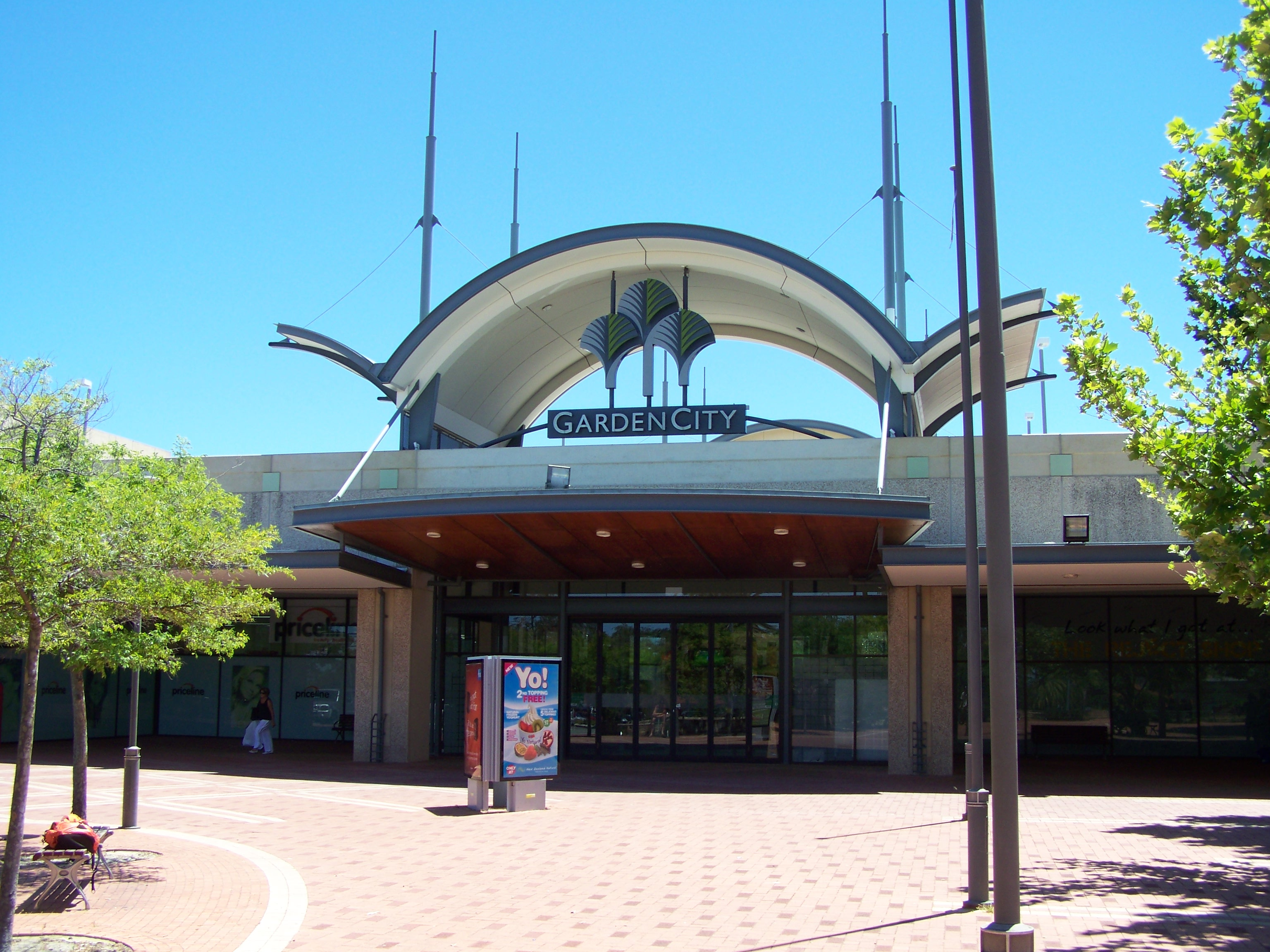 Garden City